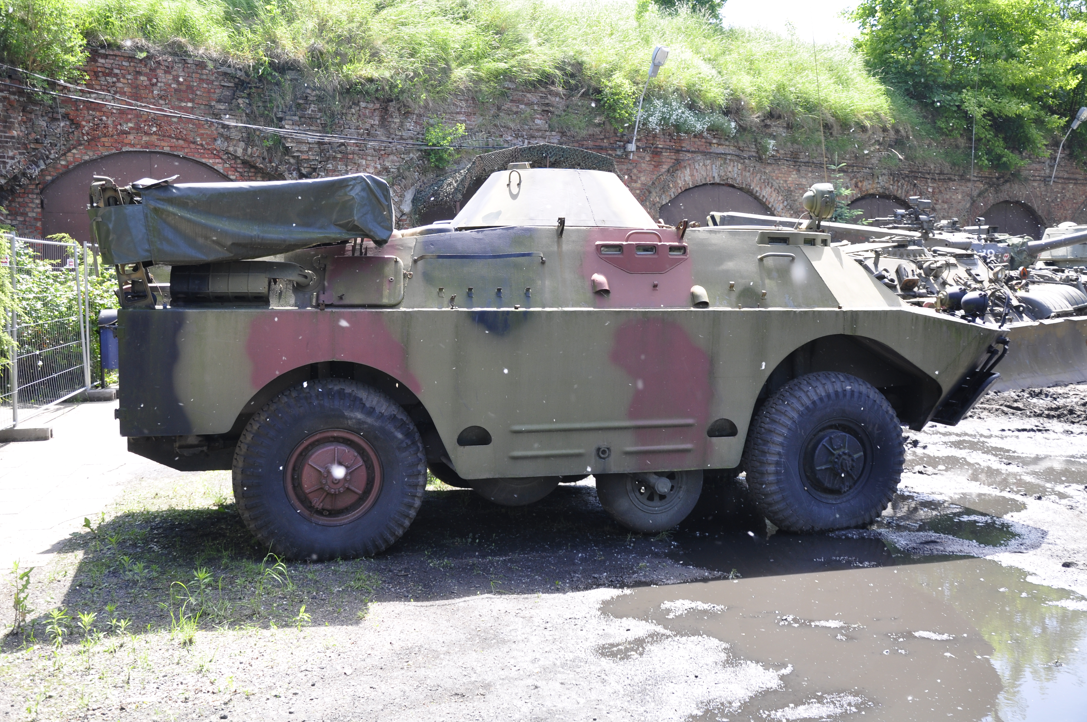 Fort IX Warschau